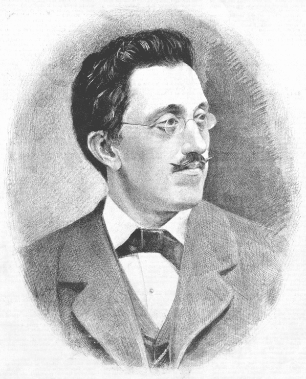 Čeněk Šercl (1843 - 1906), filolog a polyglot, profesor na ruských univerzitách (jako Викентий Иванович Шерцль). Portrét, nakreslený Janem Vilímkem pro Humoristické listy